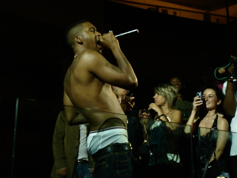 Nas in 2007.